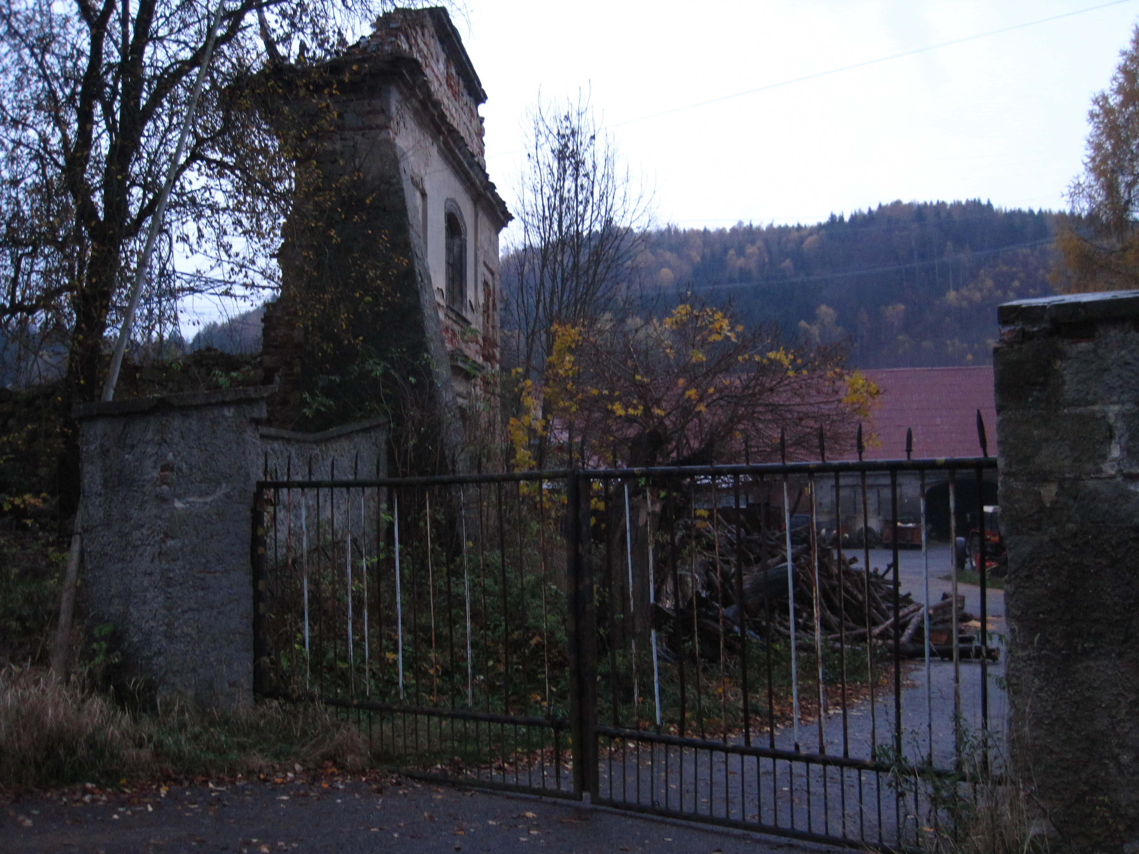 Kaple Anděla Strážce, parcely st. 2 a 4, Jílové (Hodkovice nad Mohelkou).